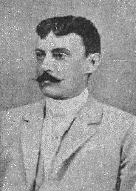 Adam Ruebenbauer (-1907)